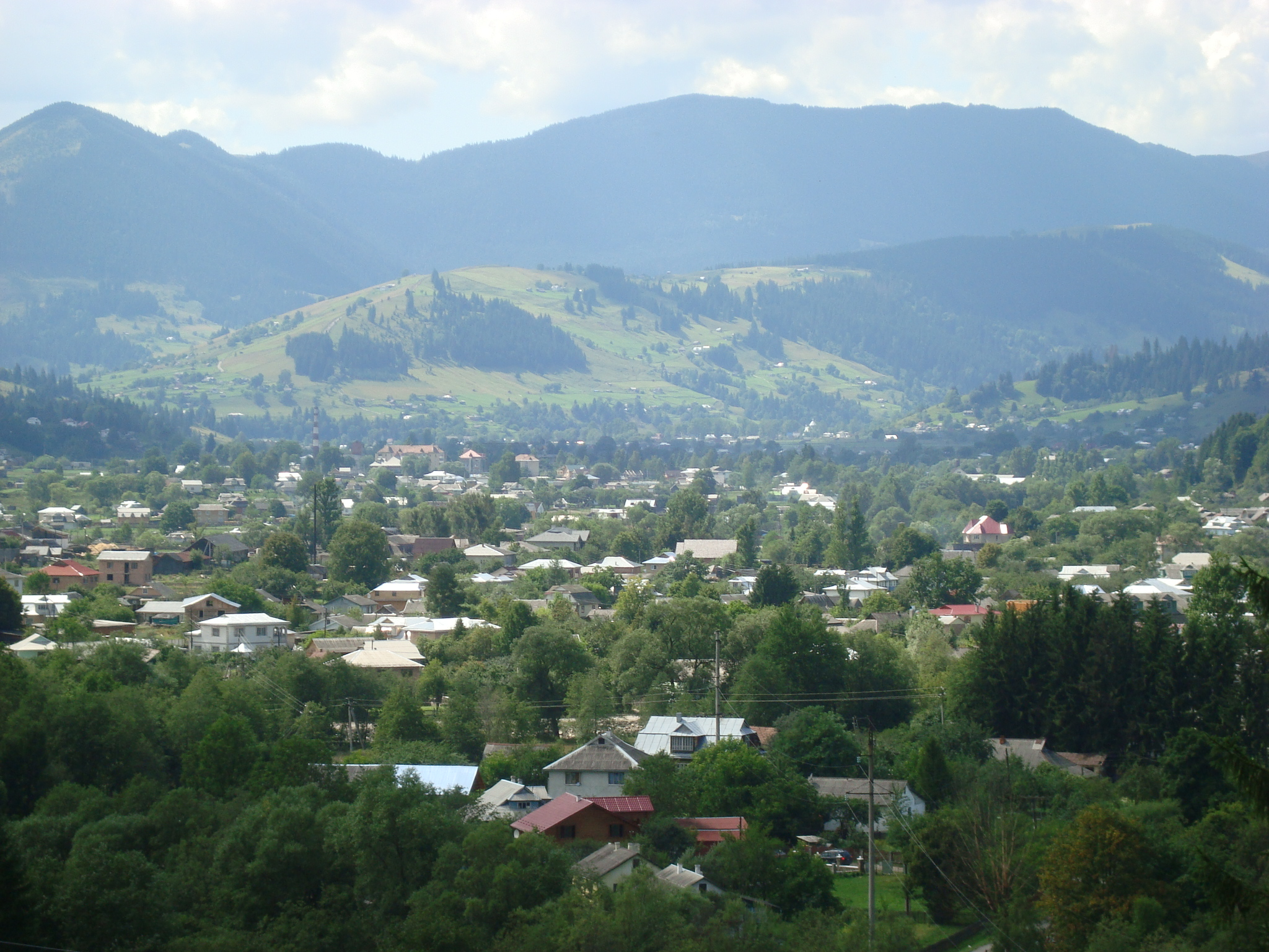 Панорама Верховини